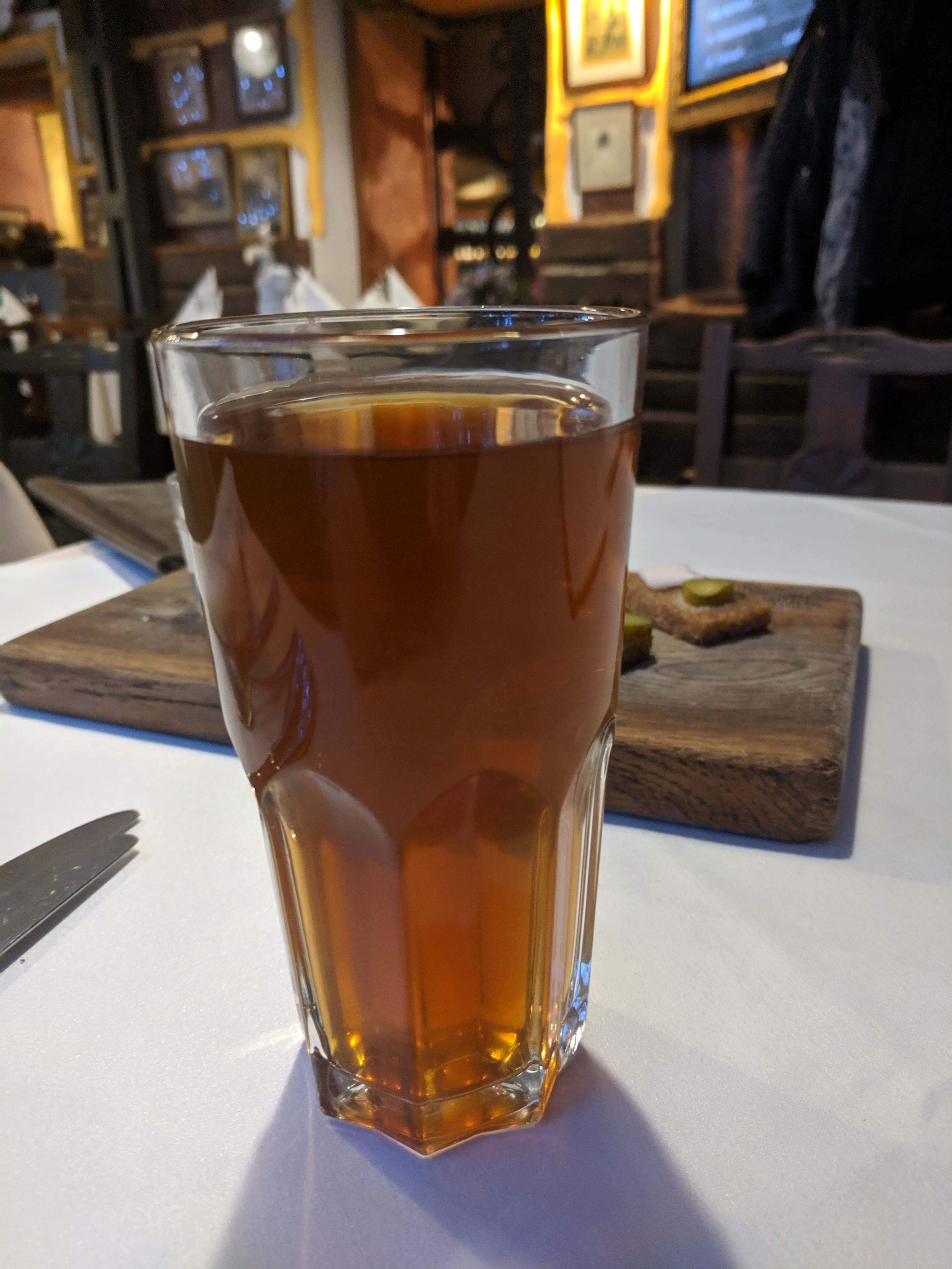 Ukrainian beverage uzvar